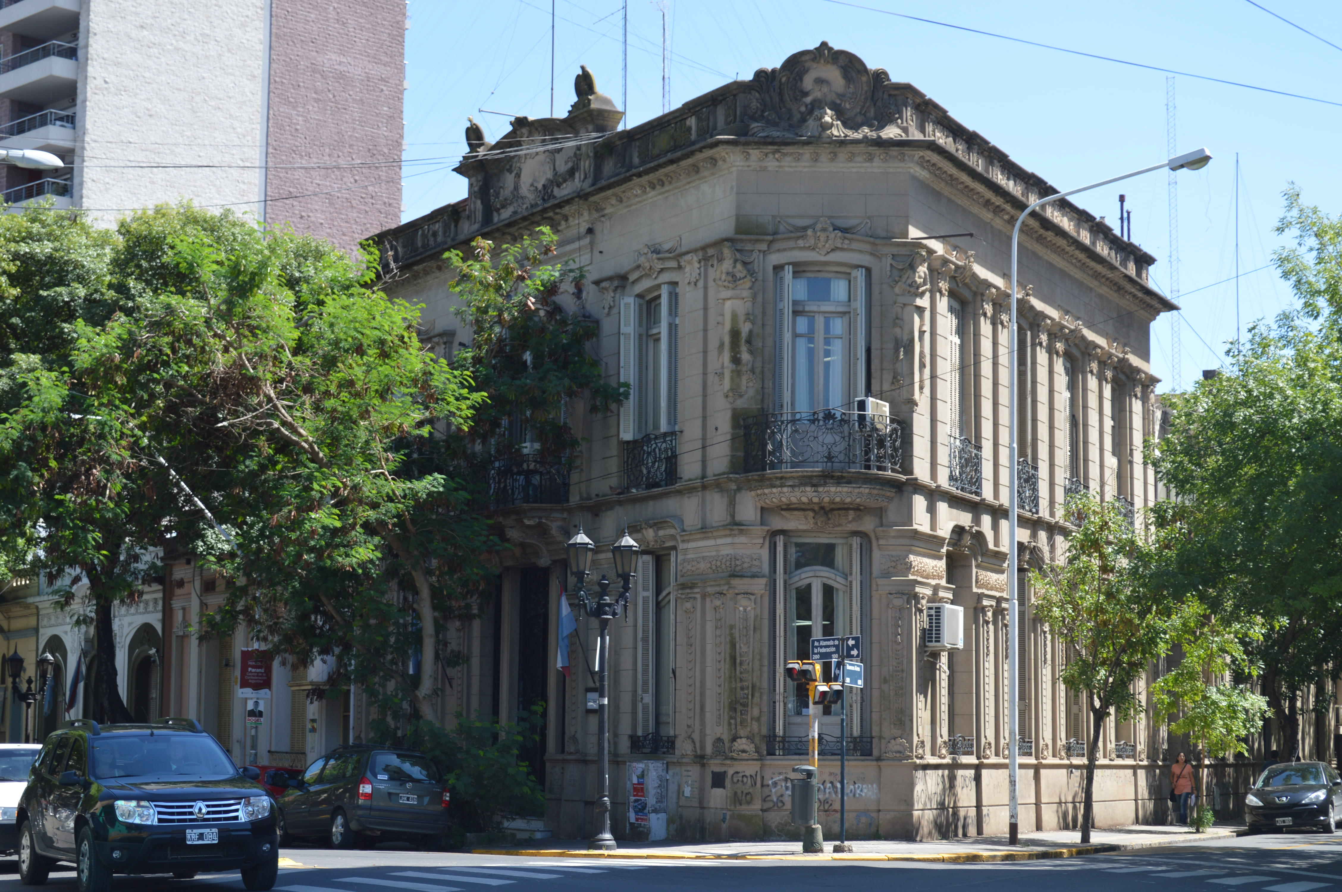 Fachada de edificio administrativo de decanato, Buenos Aires y Alameda de la Federación.